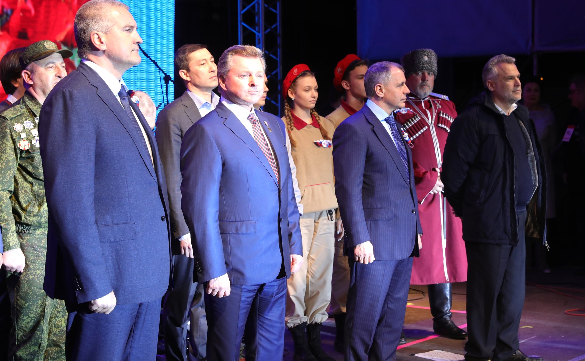 Президент Российской Федерации Владимир Путин выступил на площади Ленина в городе Симферополе, на концерте в честь пятой годовщины Крымской весны